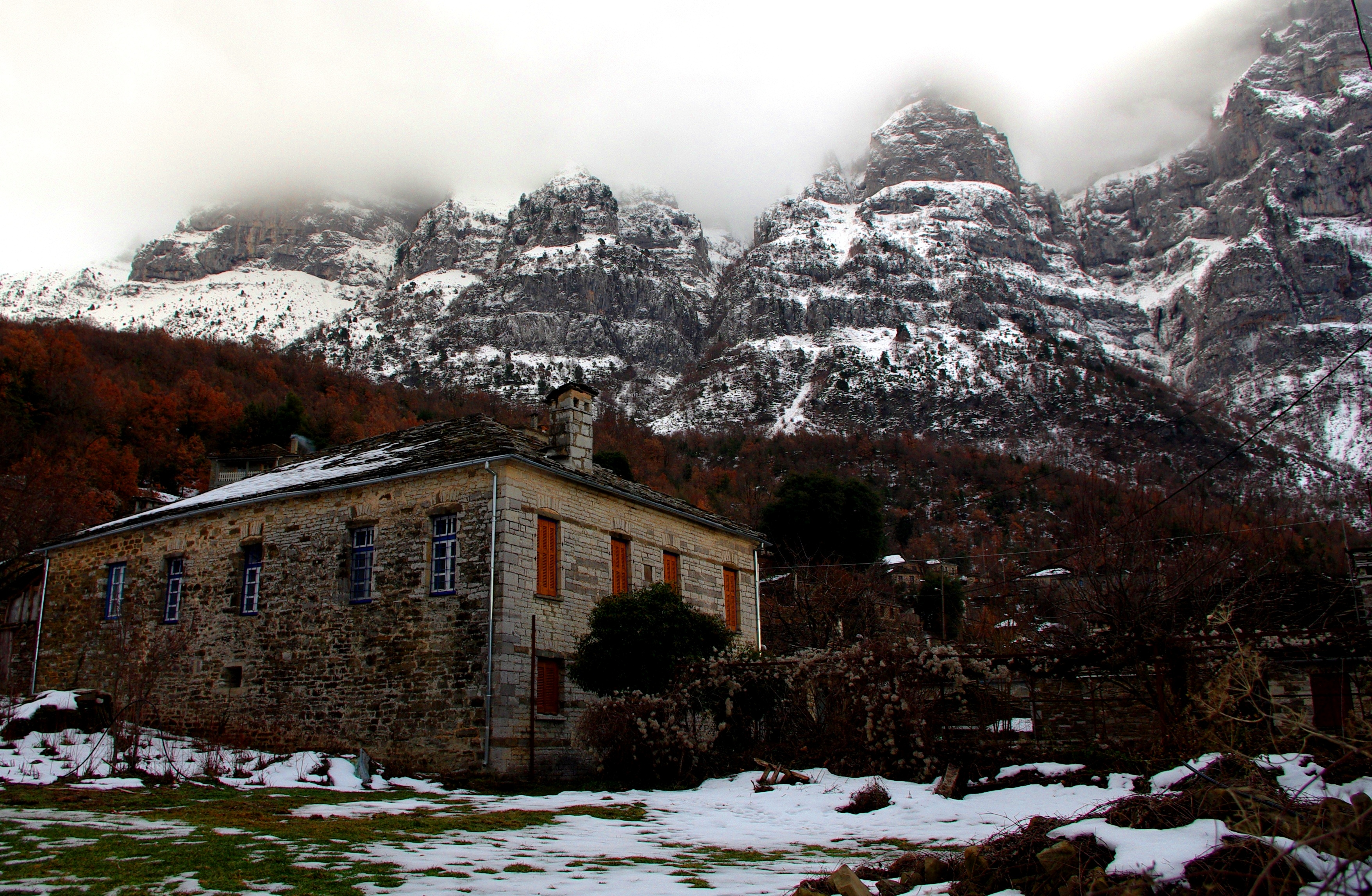 Οι πύργοι της Αστράκας από το Μικρό Πάπιγκο This is a photography of Natura 2000 protected area with ID GR2130009